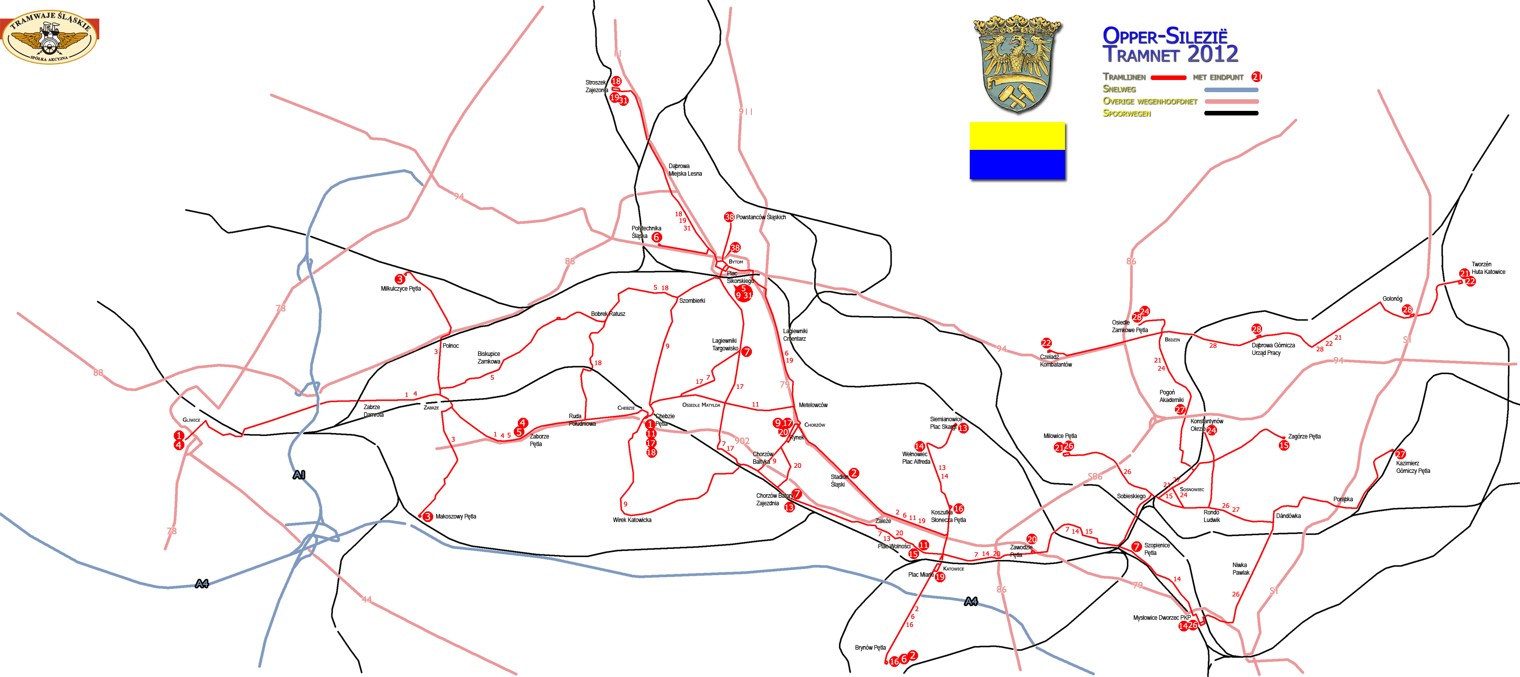 Tramnet in Opper-Silezie in 2012